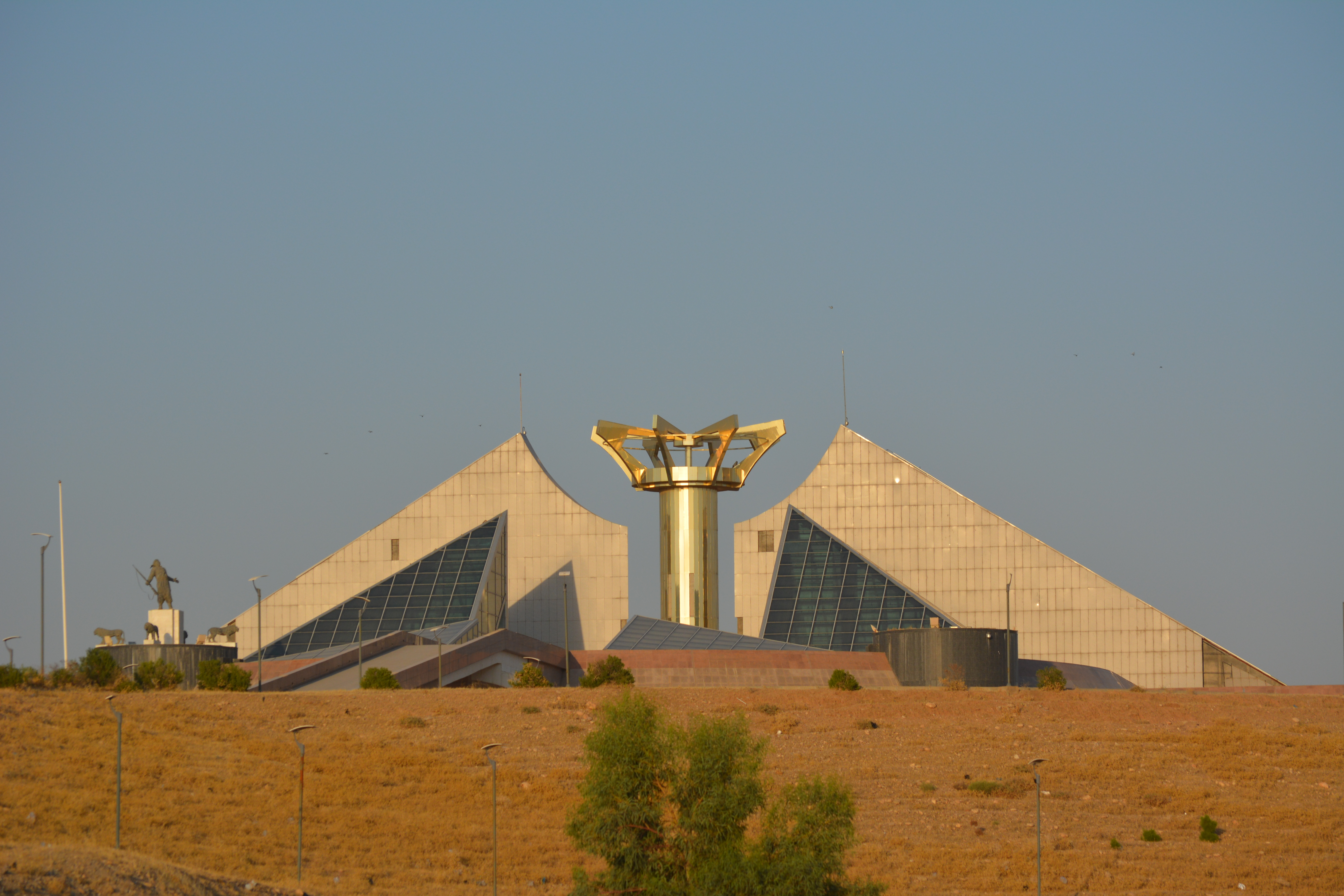 نحت الفنان والمعماري الكردي خسرو الجاف تحفة معمارية وفنية ترمز إلى شهداء الثورة الكردية ويقوم فوق أرض مساحتها 25 دونما بتكلفة تقترب من 19 مليون دولار وتم البدأ ببنائه في سنة 2010 وتم الانتهاء منه في سنة 2012.